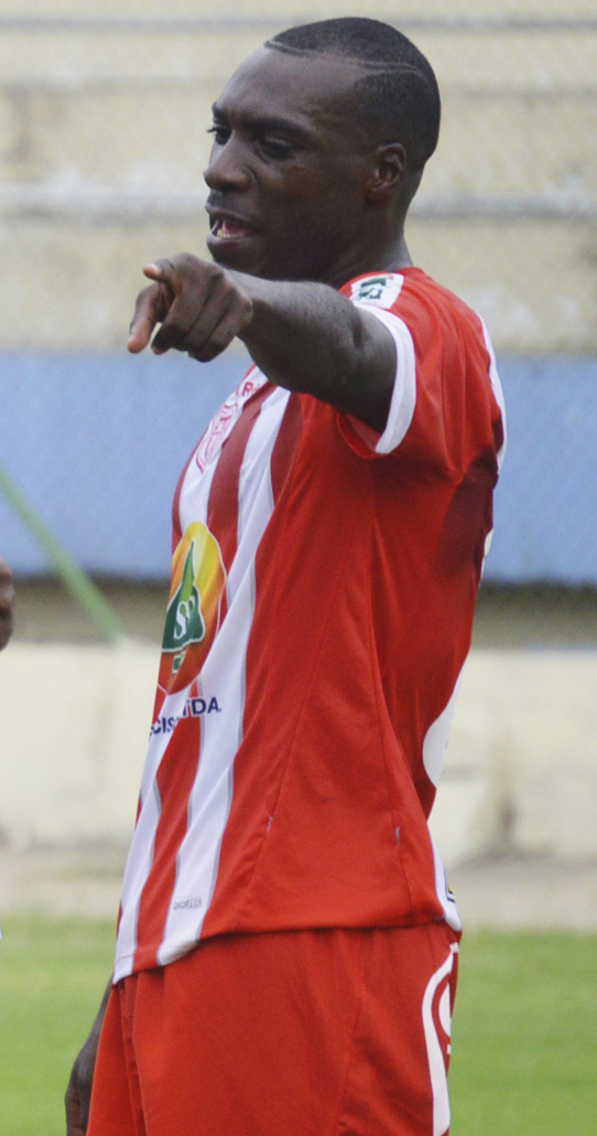 Ronal de Jesús jugando para Técnico Universitario en el 2014